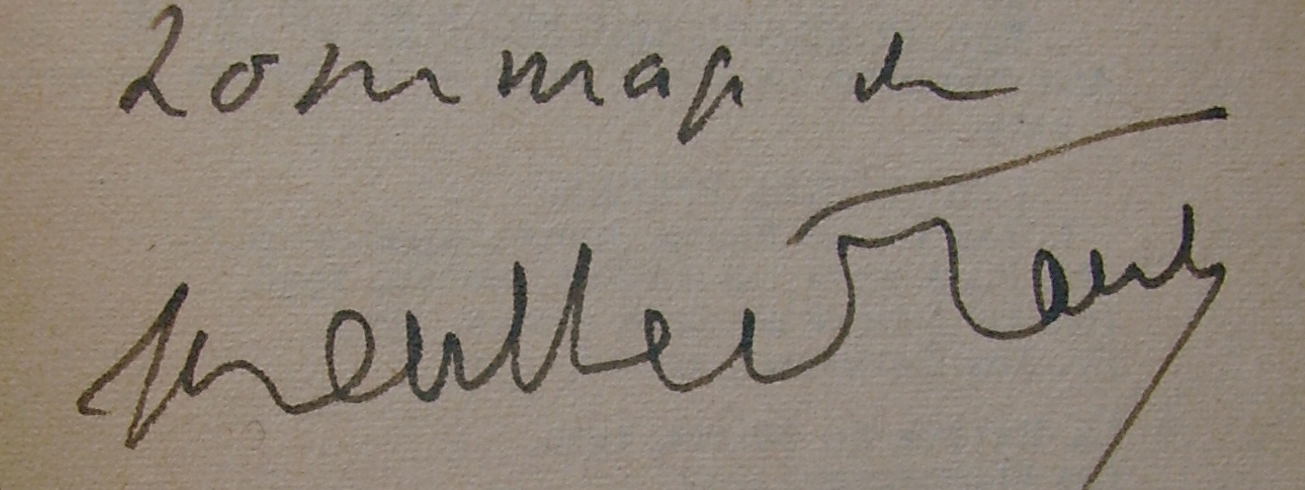 Envoi de Henry de Montherlant